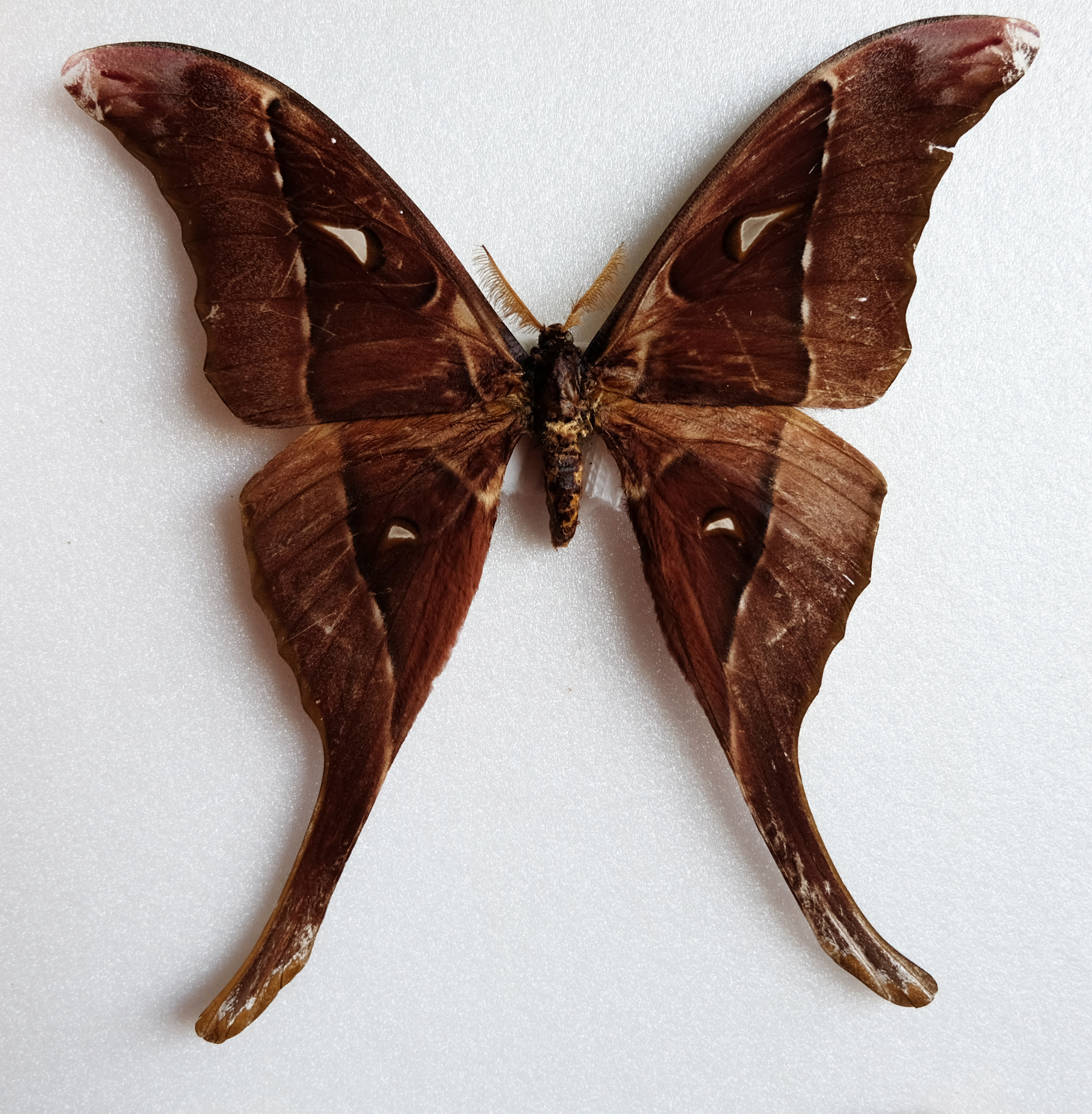 Самец павлиноглазки геркулес (Coscinocera hercules)